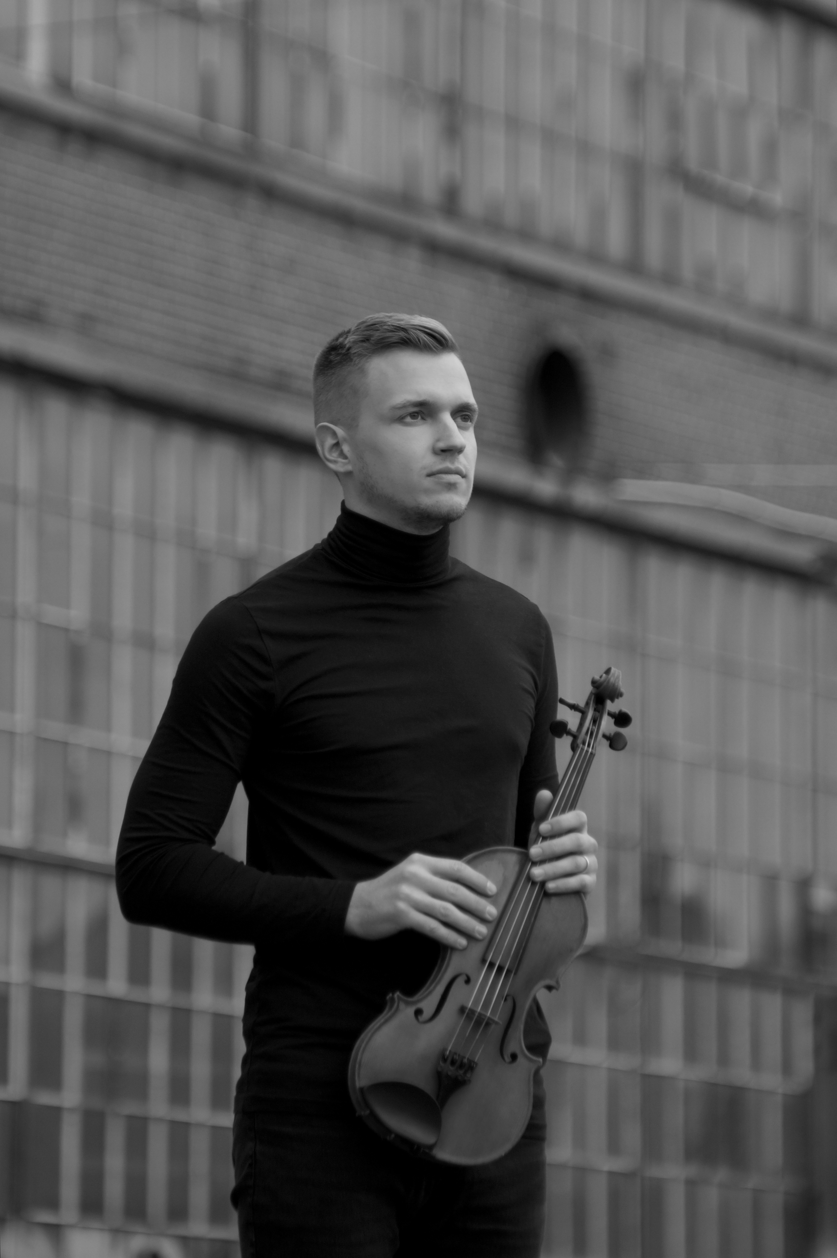 Picture ARVØ by Jacob F. Schmiedel